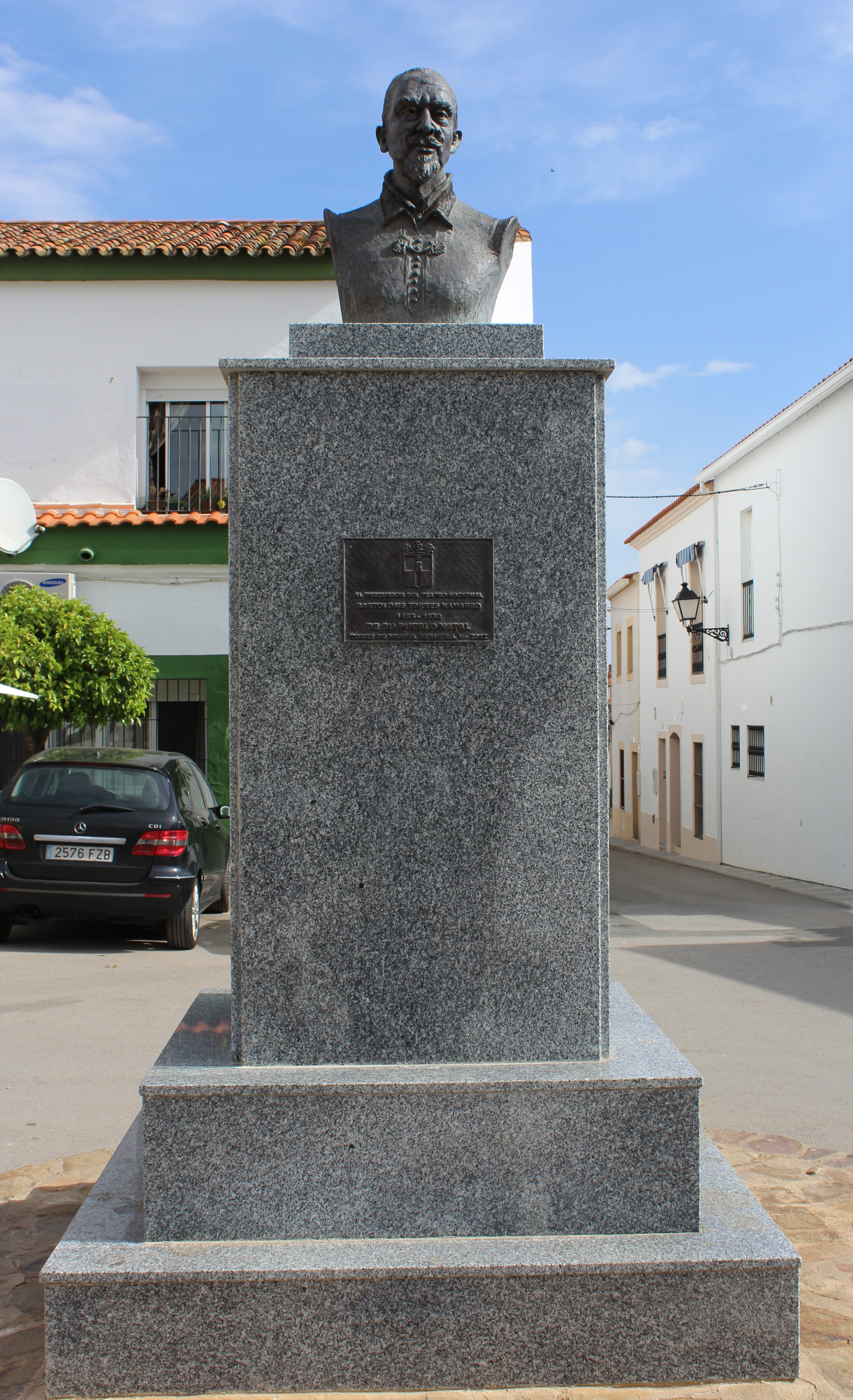 Monumento a Torres Naharro enTorre de Miguel Sesmero